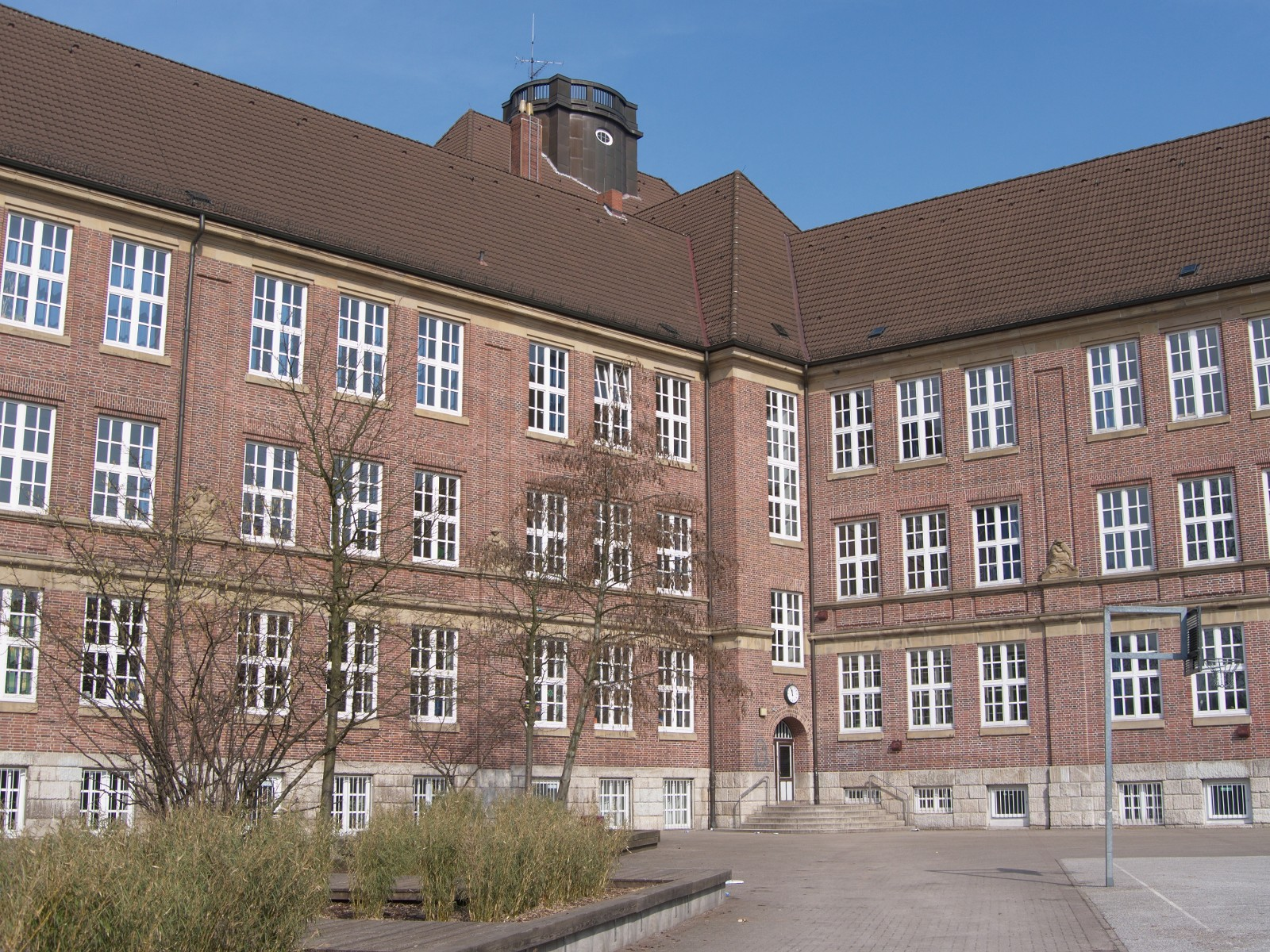 Gymnasium Kaiser Friedrich Ufer This is a photograph of an architectural monument.